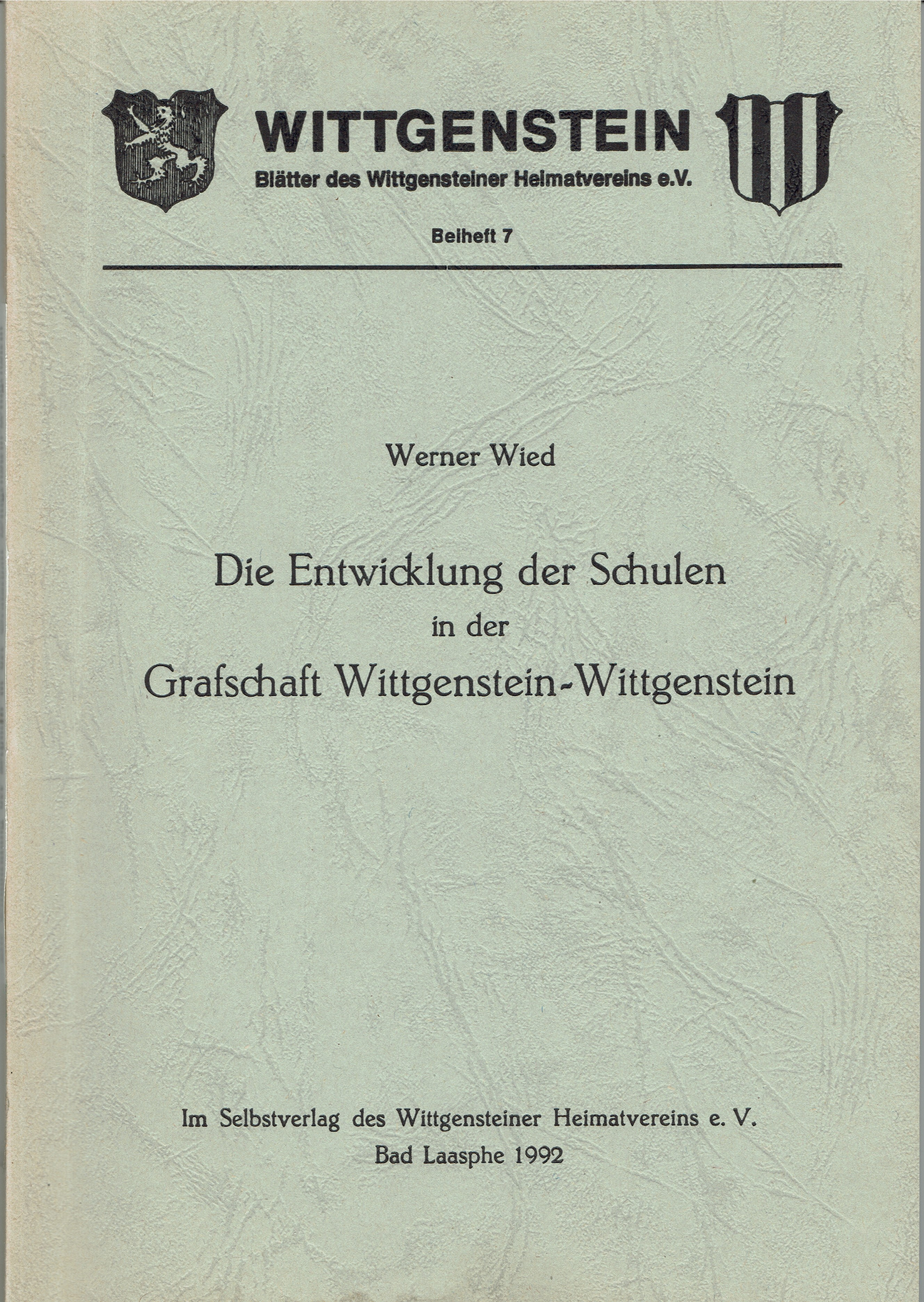 Deckblatt des Buches "Die Entwicklung der Schulen in der Grafschaft Wittgenstein-Wittgenstein.